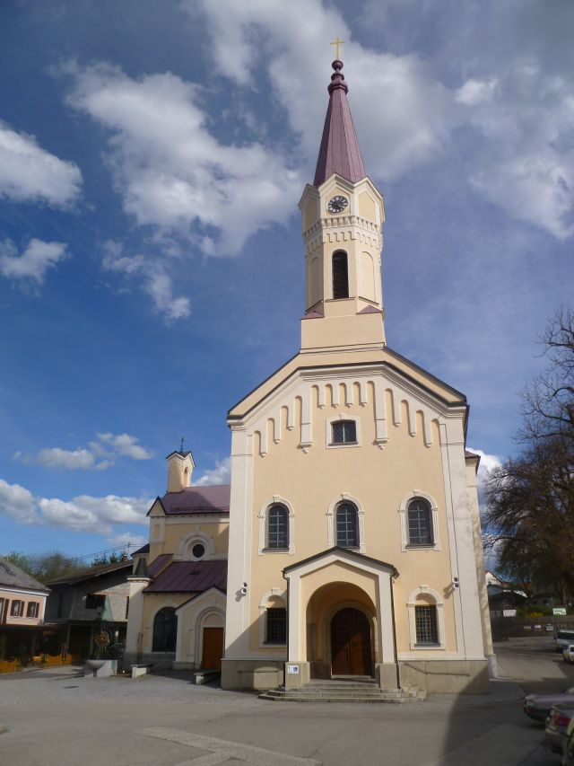 Kath. Pfarrkirche, Wallfahrtskirche Maria-Hilf und Verbindungsgang zum Kloster